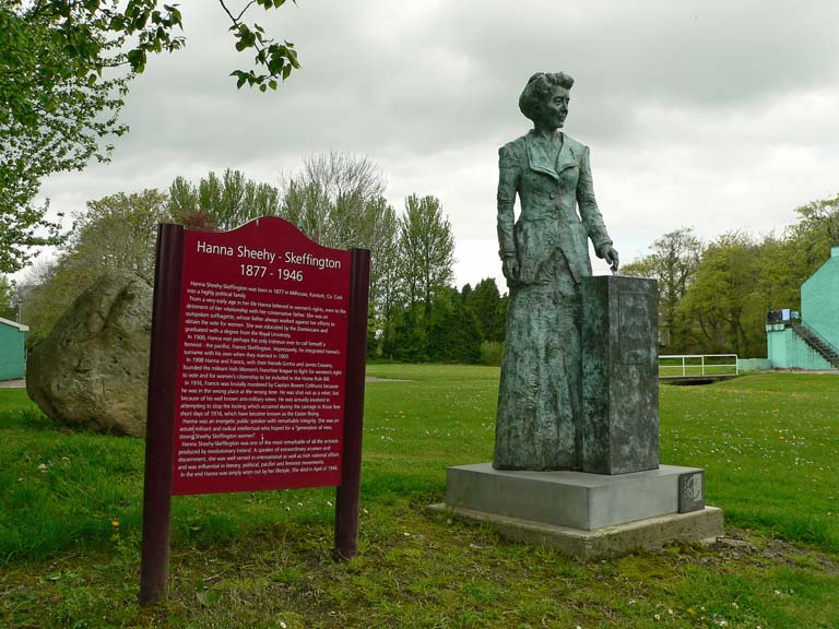 Kanturk (Ireland). La statua di Hanna Sheehy-Skeffington nel parco della città